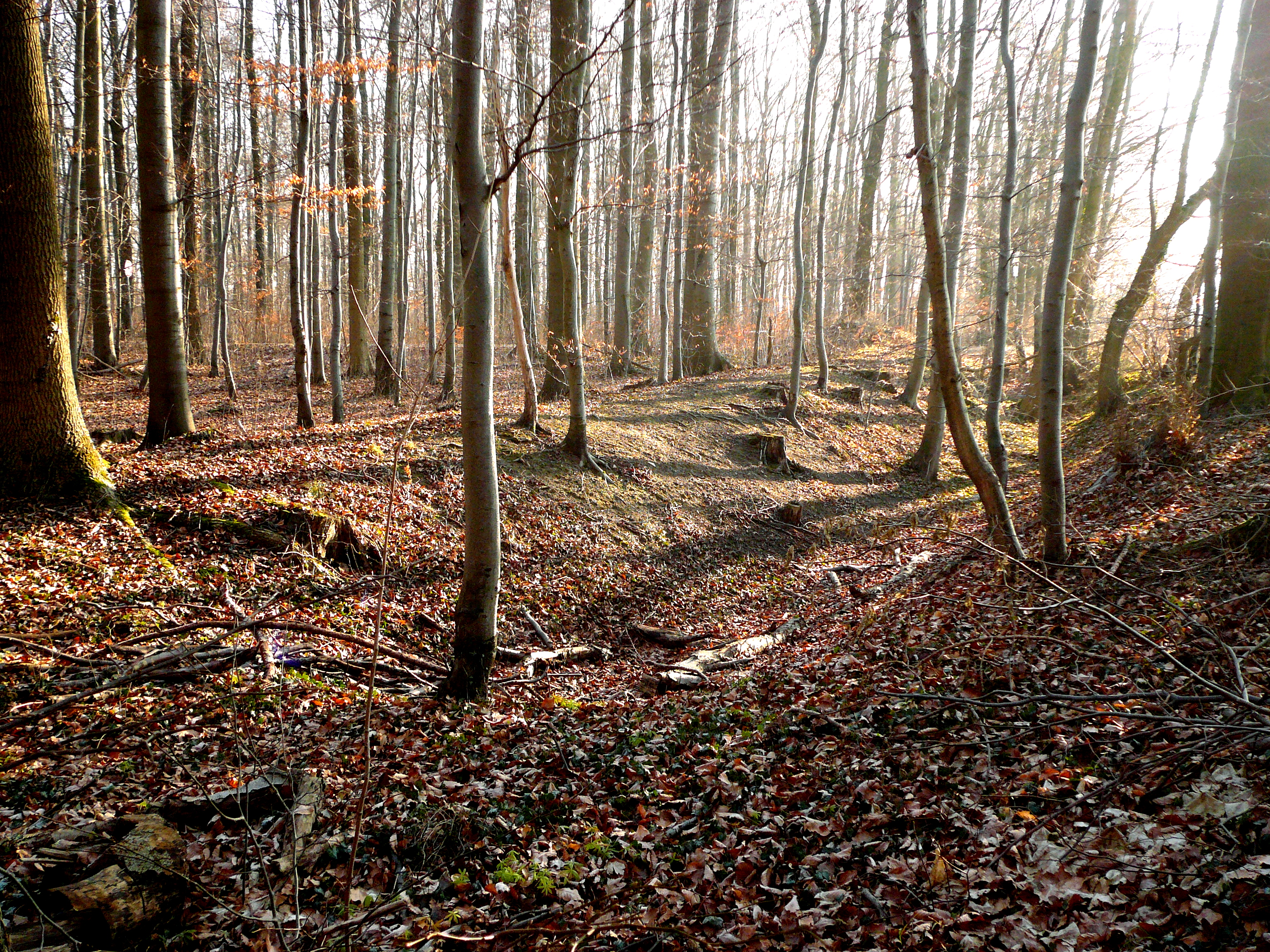 Reste von Wall und Graben der zweiten (äußeren) spätmittelalterlichen Landwehrlinie der Stadt Göttingen nordöstlich von Nikolausberg bei der Rieswarte am Waldrand des Pleßforsts (Göttinger Wald), gelegen im Landschaftsschutzgebiet „Leinetal“.